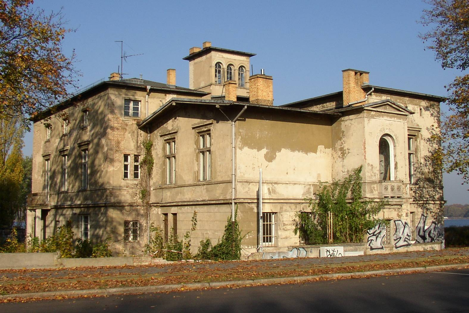 Villa Schöningen in Potsdam in Brandenburg, Deutschland. Die Sanierung soll ab 2007 beginnen.